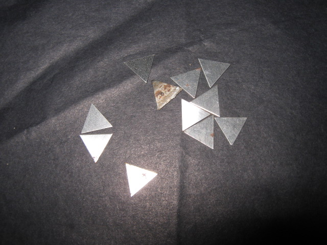 "Glaserecken"- gleichschenklige Dreieckeaus Blech, Kantenlänge ca. 11mm, zum Fixieren von Flachglas in Holzfälzen